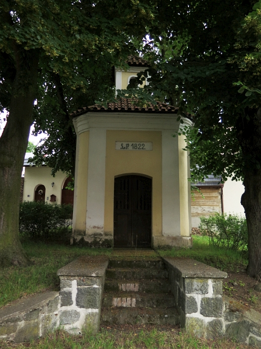 Kaplička se zvonicí, náves, před čp. 8, Nesvačily (okres Beroun).